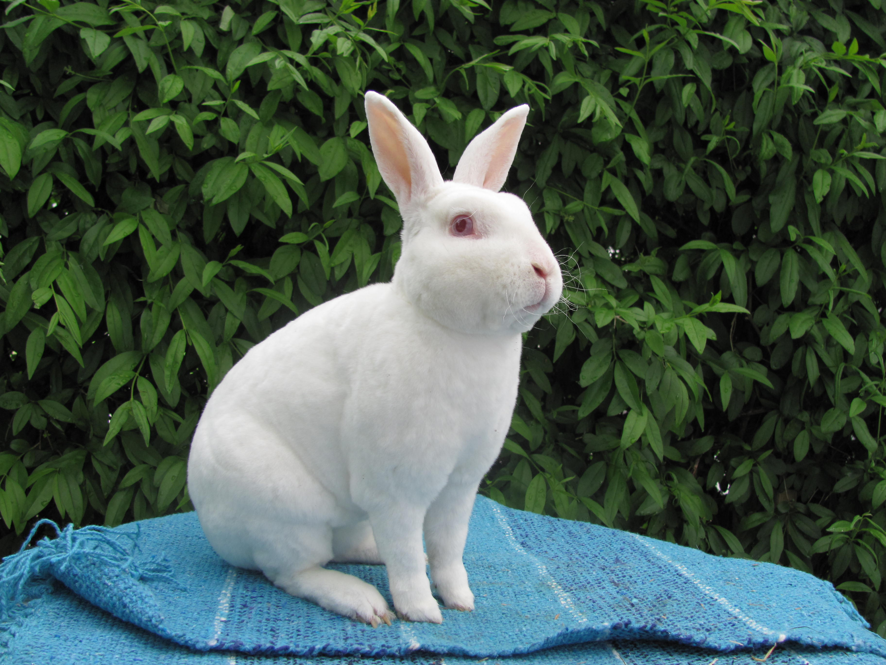 Kleinrex Kaninchen Rammler weiß Rotauge Züchter Marina Caldwell-Schäffer